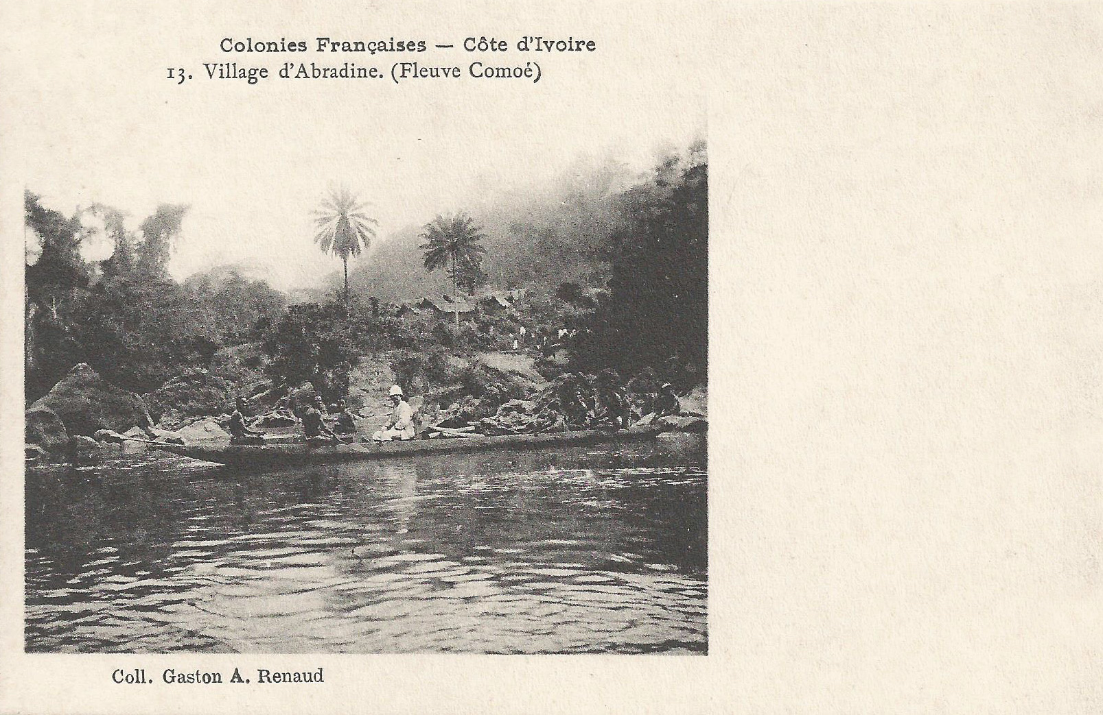 Sur les rives du fleuve Comoé. Les rapides de Pétépré. Colonies françaises. Côte d'Ivoire